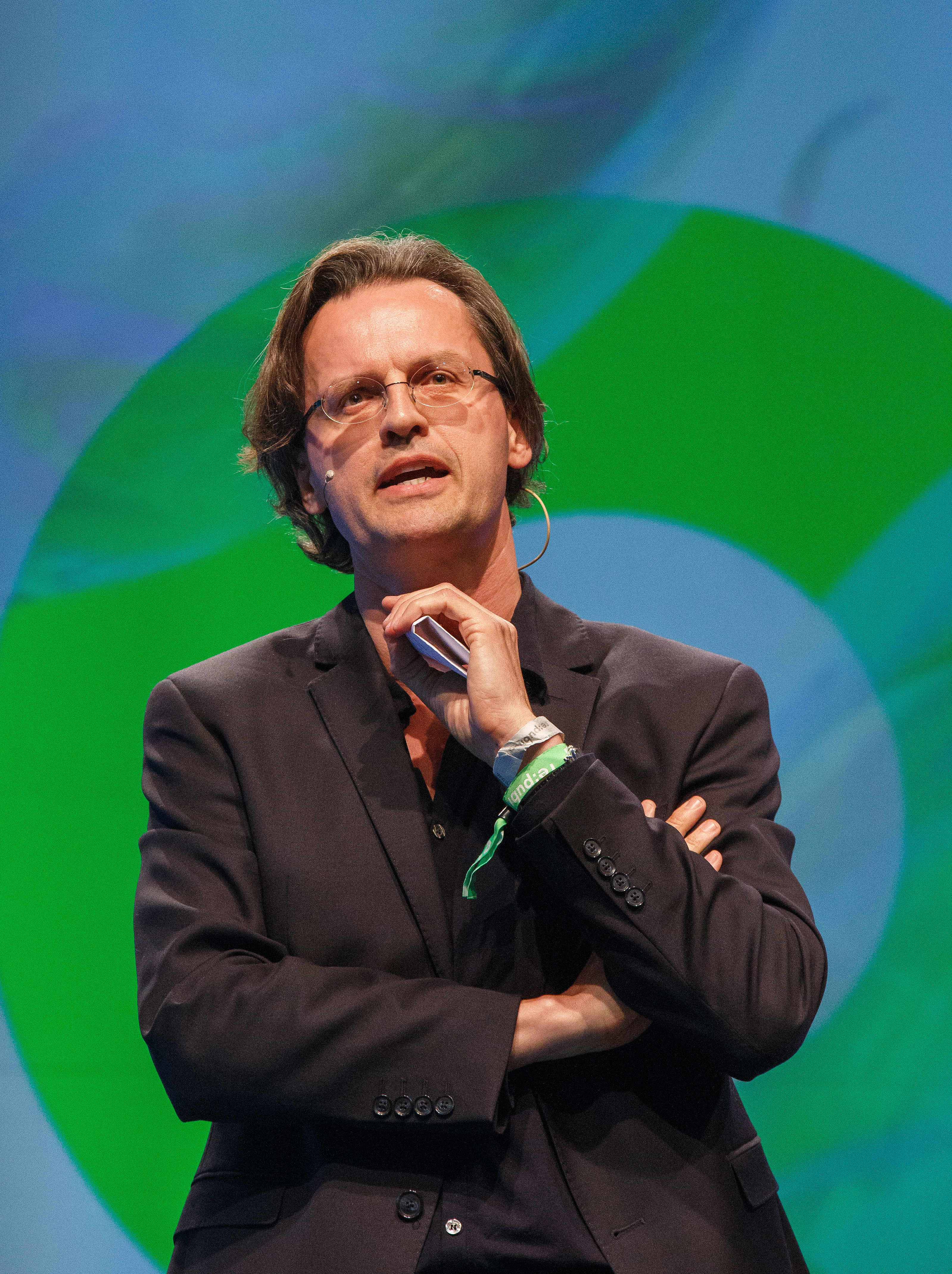 02.05.2018, Berlin: Talk: Filter Clash. Die große Gereiztheit der vernetzten Welt Speaker: Bernhard Pörksen Die re:publica ist eine der weltweit wichtigsten Konferenzen zu den Themen der digitalen Gesellschaft und findet in diesem Jahr vom 02. bis 04. Mai in der STATION-Berlin statt. Foto: Jan Michalko/re:publica